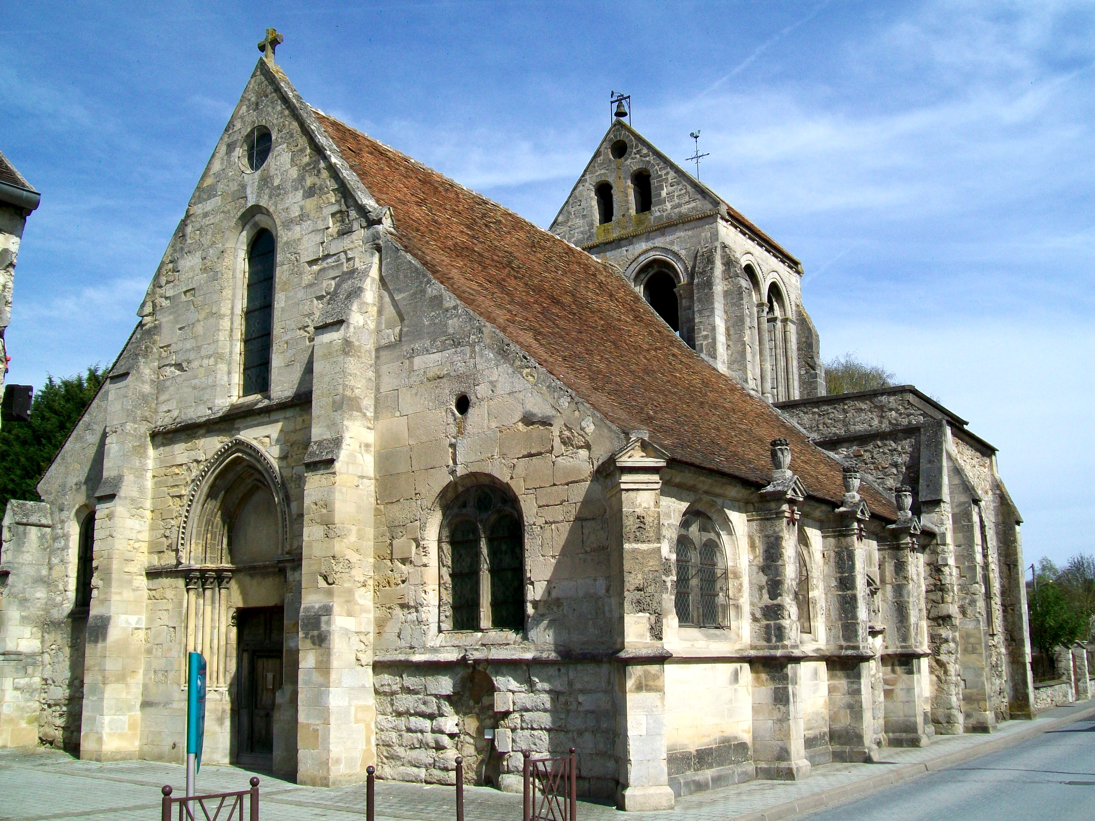 L'église Saint-Étienne de Fosses (95), vue depuis le sud-ouest. Le bas-côté sud a été construit dans le style de la première Renaissance.